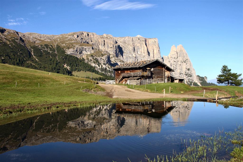 Schlern gezien vanaf de Seiseralm.